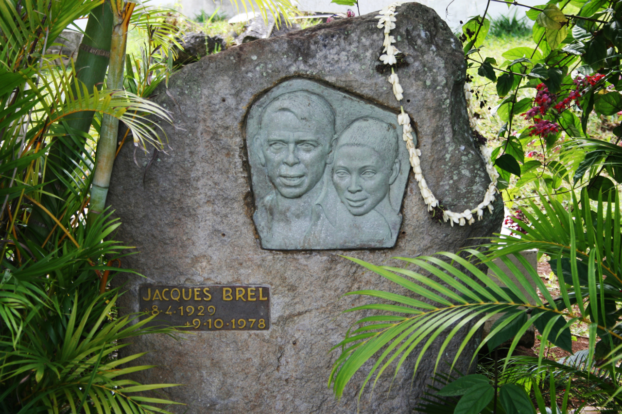 Tombe de Jacques Brel à Atuano (Hiva Oa)